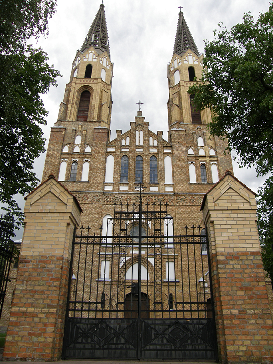 Korycin - kościół. Fotografia wykonana 11 lipca 2007 r. przez Jana Burnewicza aparatem Olympus SP-550UZ